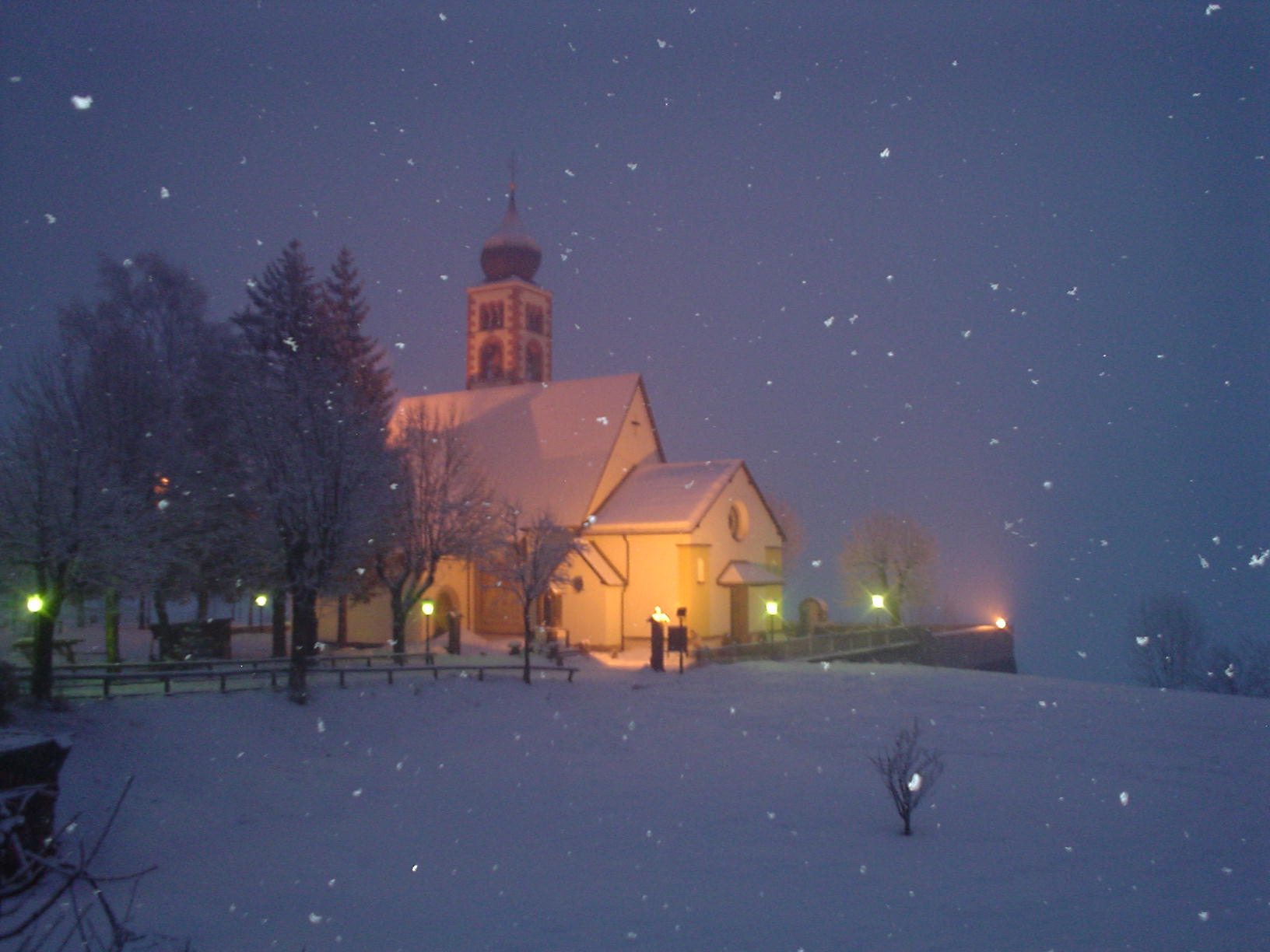 Chiesa di Daiano (provincia di Trento), inverno 2006